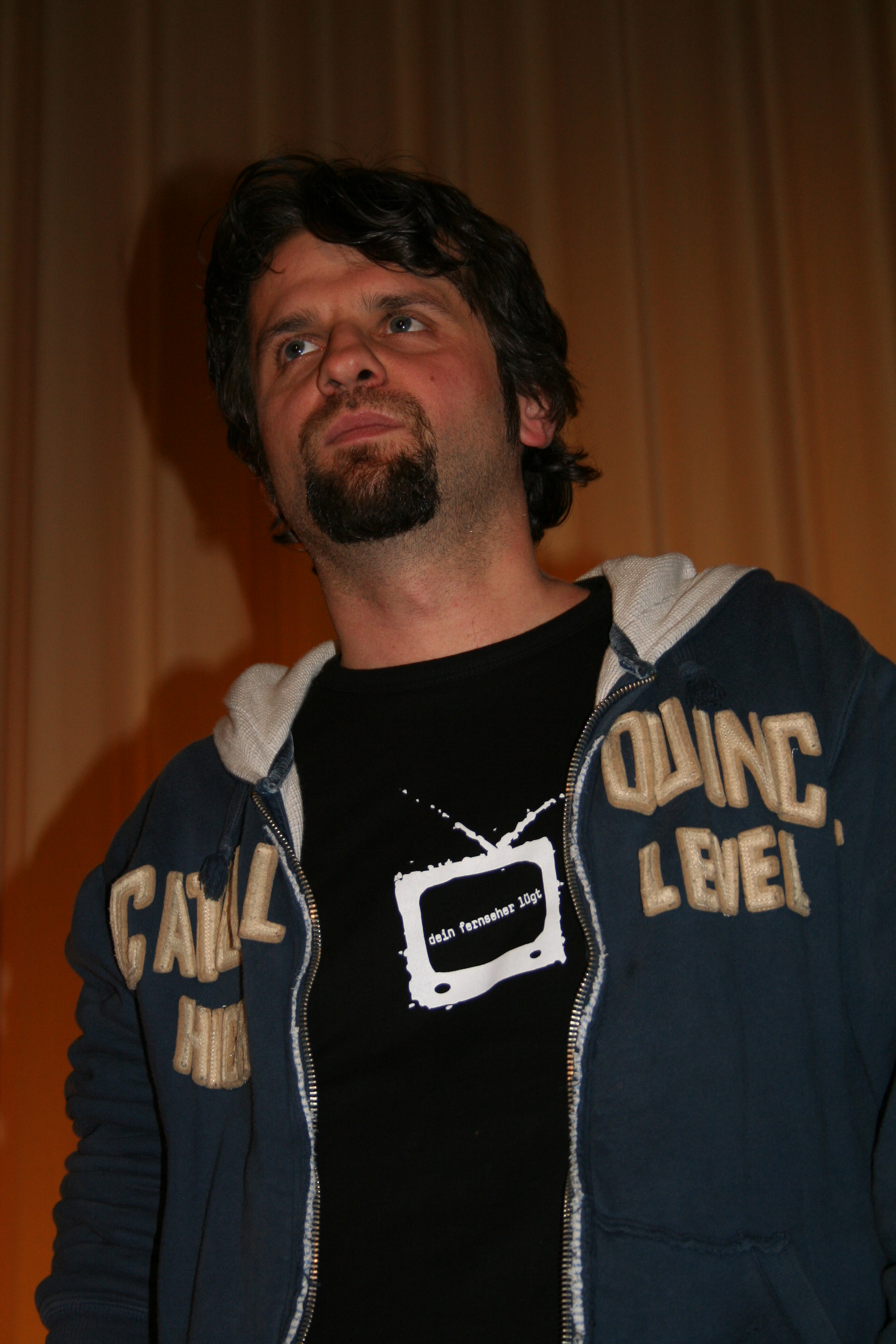 Hans Weingartner im Cineplex Münster bei der Preview seines Films "Free Rainer".